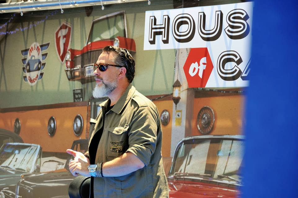 Presentación de la serie en Plaza Callao